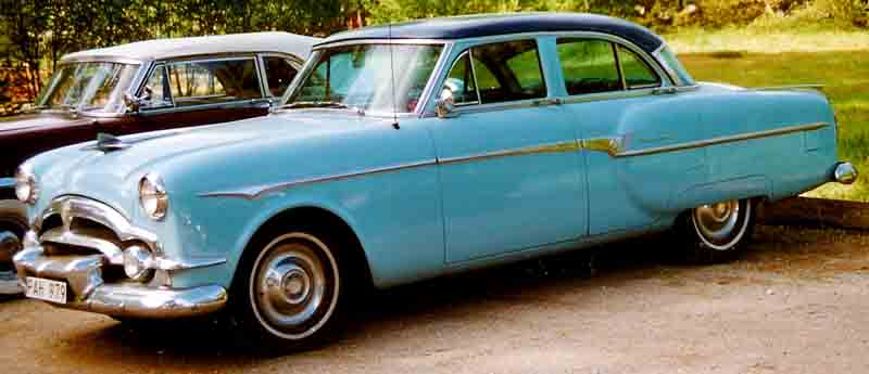 Packard Clipper Deluxe Touring Sedan (4-Door) Model 2611 (1953)